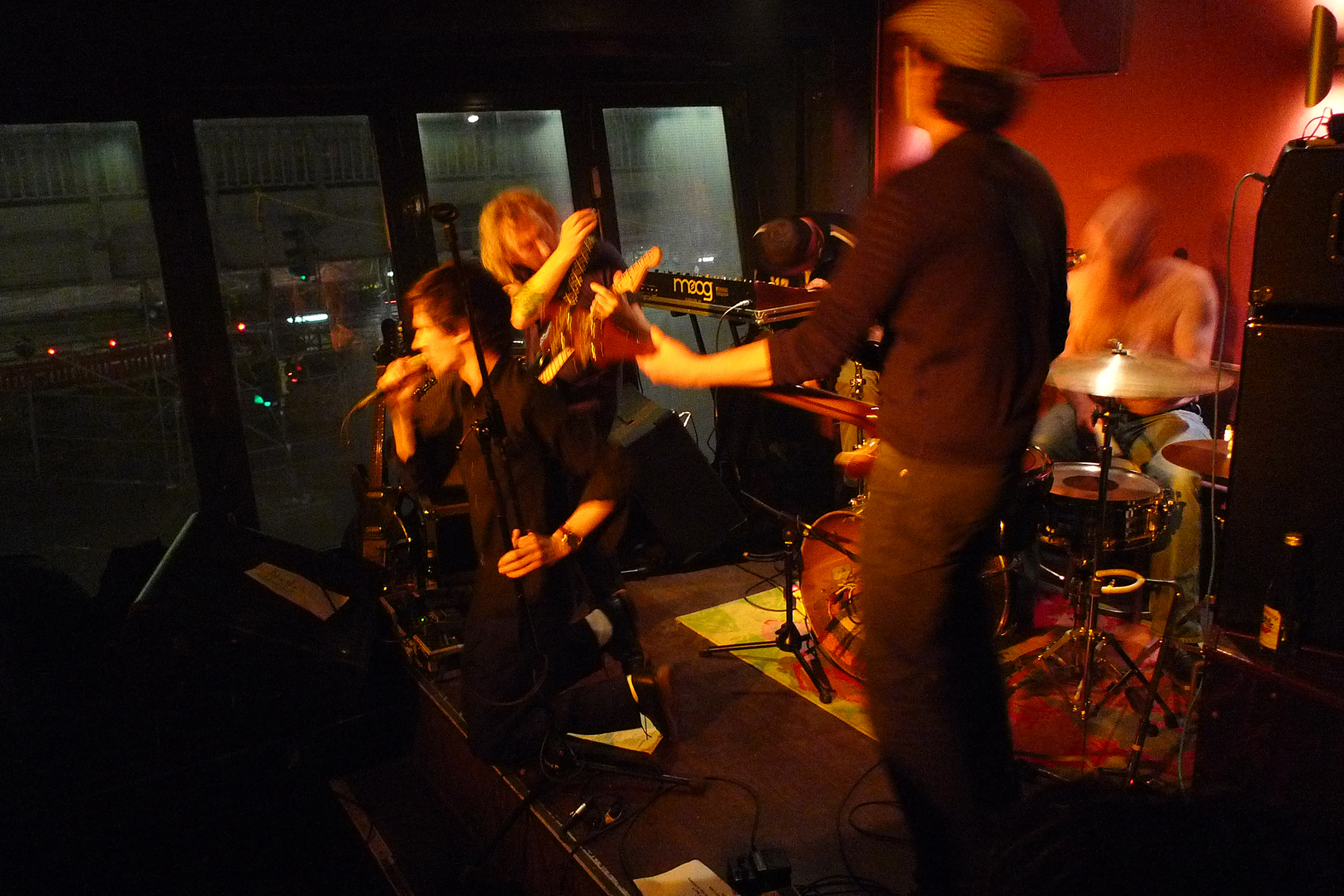 Die Berliner Band Mutter im Konzert im Club Monarch am 21.3.2010 in Berlin-Kreuzberg